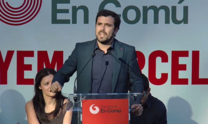 Alberto Garzón en un acto de Barcelona en Comú.